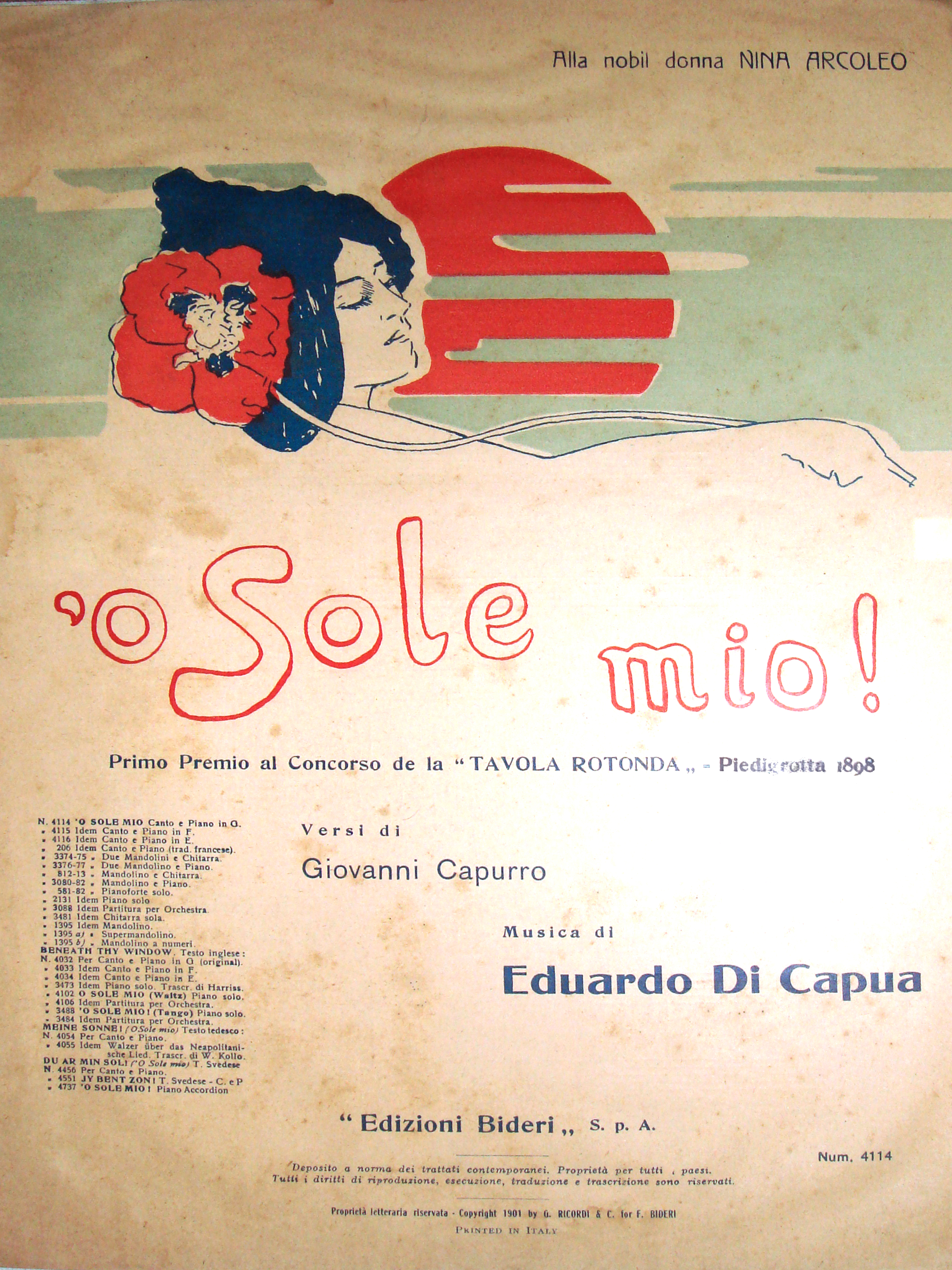 Copertina della partitura originale del brano "'O sole mio" del 1898. Sono il proprietario della partitura. Licensing Categoria:Immagini di musica